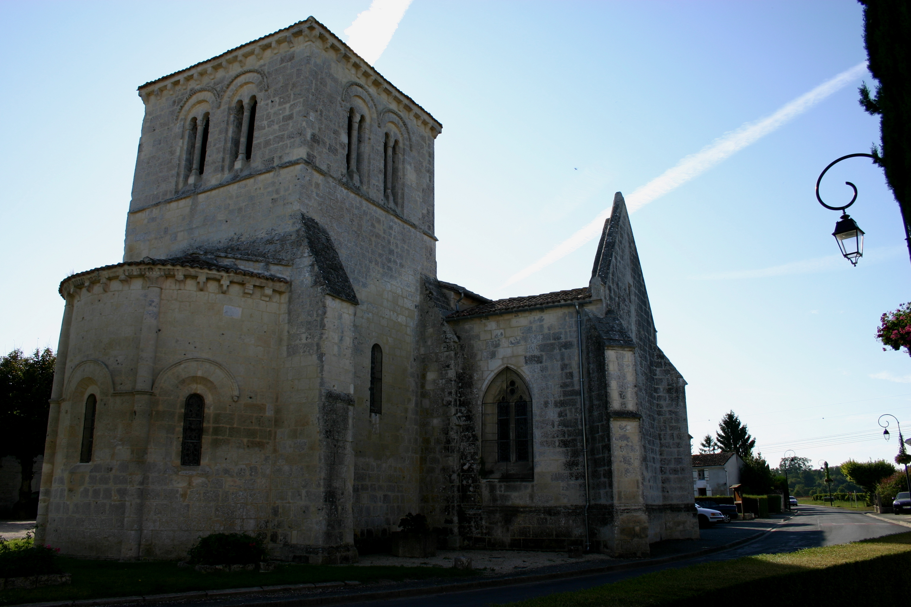 Église Saint-Martin de Courcoury .